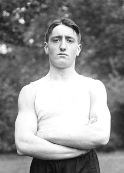 Coureur à pieds : Faillot : [photographie de presse] / Agence Meurisse